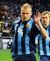 Djurgårdens IF Player Vytautas Andriuškevičius.